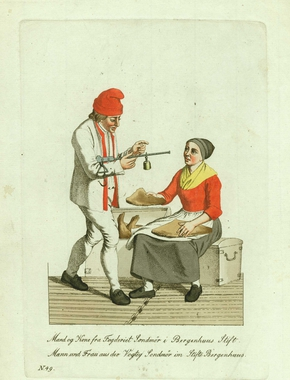 Mann og kone i folkedrakter fra Sunnmøre, Møre og Romsdal, han med bismer for veiing av klippfisken hun holder i hånden. Hun sitter på en kiste, en annen kiste er fylt med klippfisk. Fra plansjeverket "Norske Nationale Klædesdragter", utgitt i København 1812-1815.